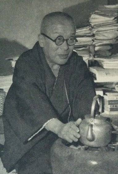 十二代目田辺南鶴